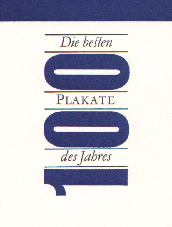 Logo des Plakatwettbewebes "Die 100 besten Plakate des Jahres" (1966-1990)